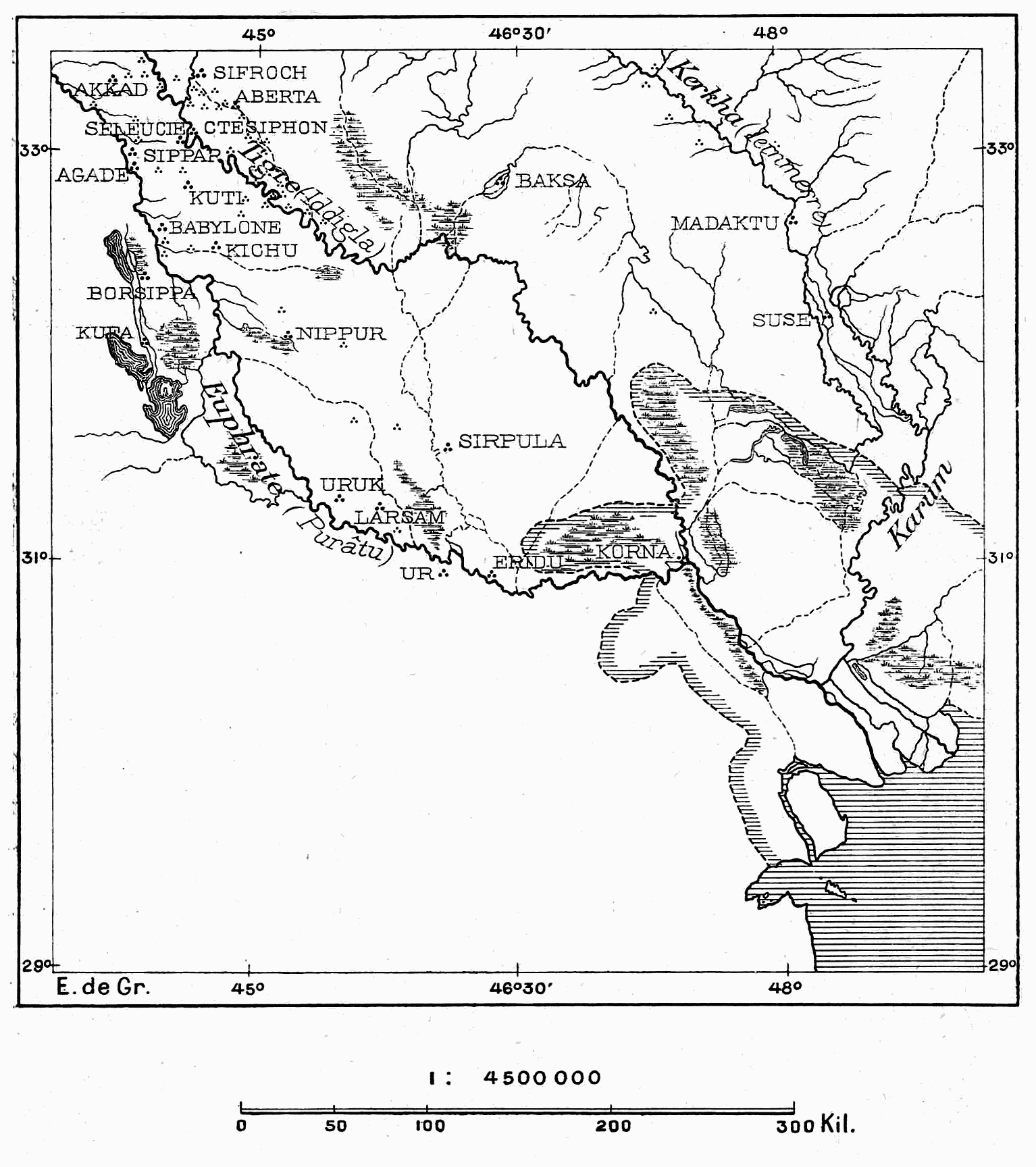 Anciennes villes de la Chaldée